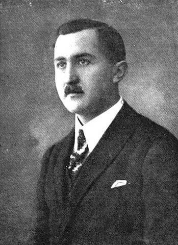 Karel Driml (1891 - 1929), Český lékař.